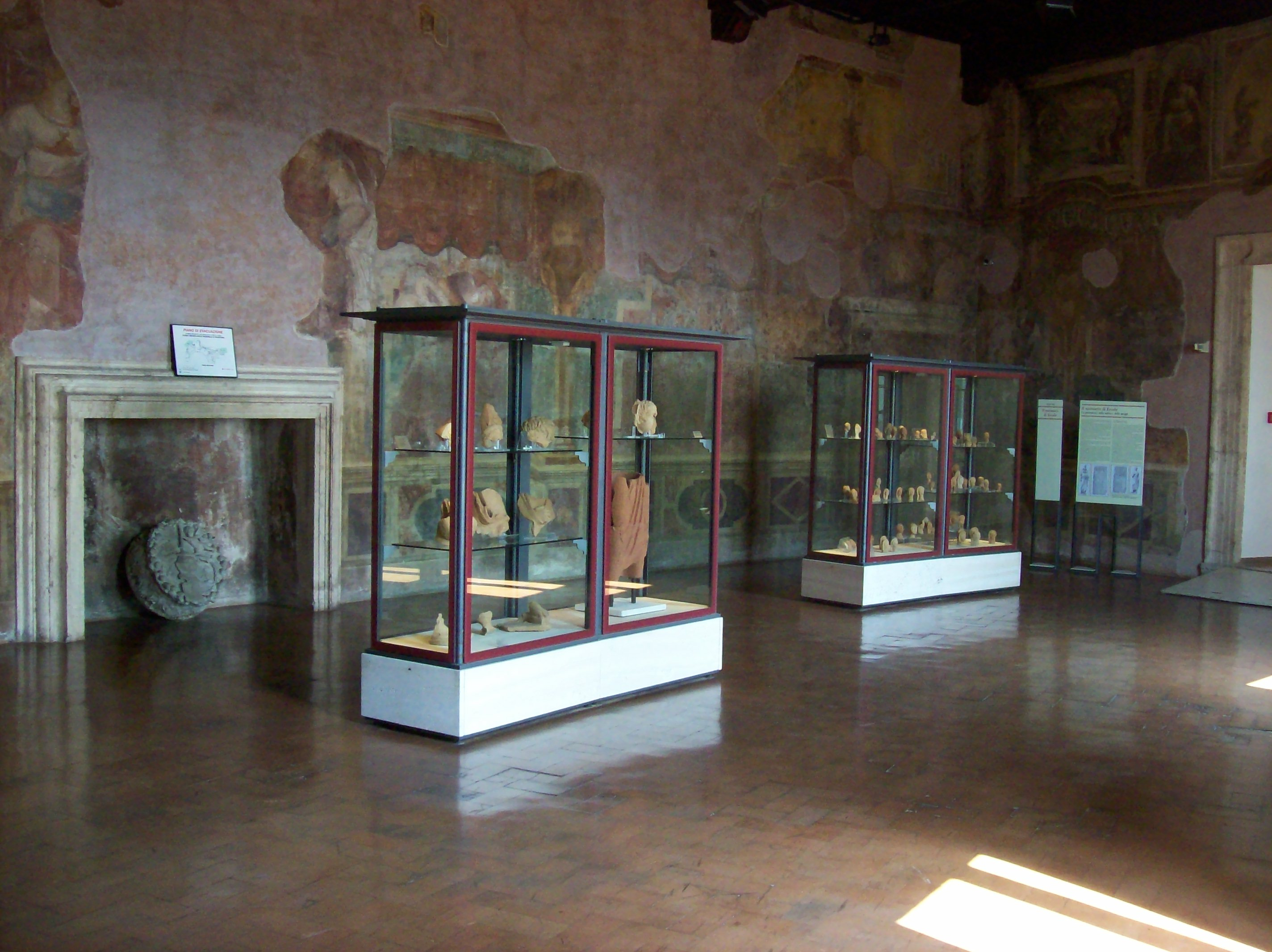 Bacheche contenenti reperti e corredi di tombe della necropoli prenestina; museo archeologico prenestino di Palestrina